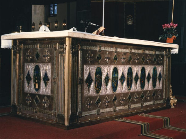 Altare c/o San Domenico di Palermo (smalto su argento) - Opera propria